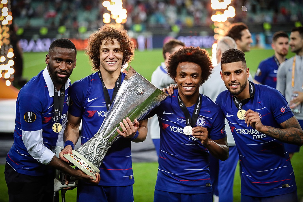 مسابقه چلسی و آرسنال، فینال لیگ اروپا ۲۰۱۹